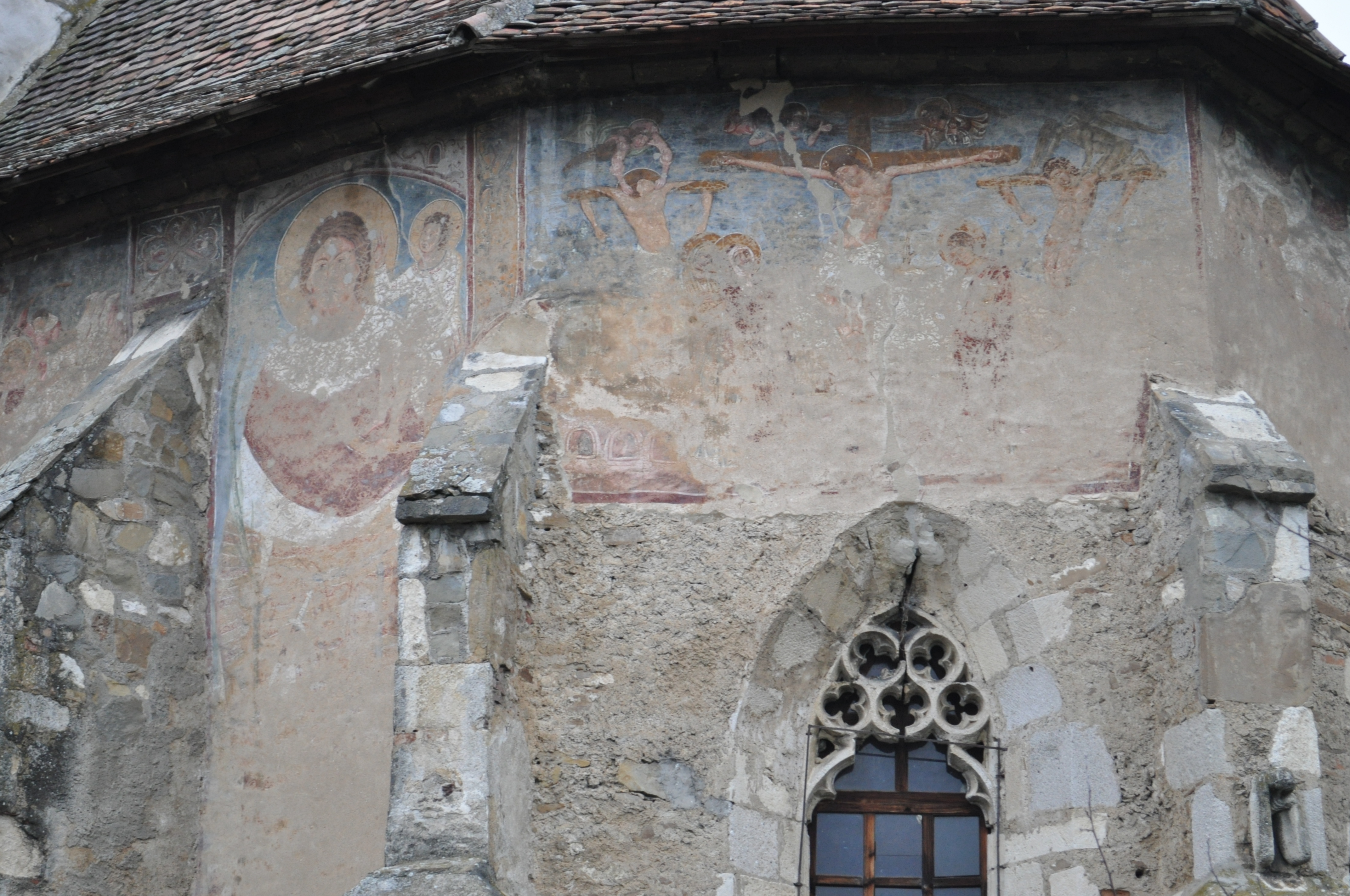 Biserica evanghelică, sat DÂRLOS; comuna DÂRLOS, județul Sibiu